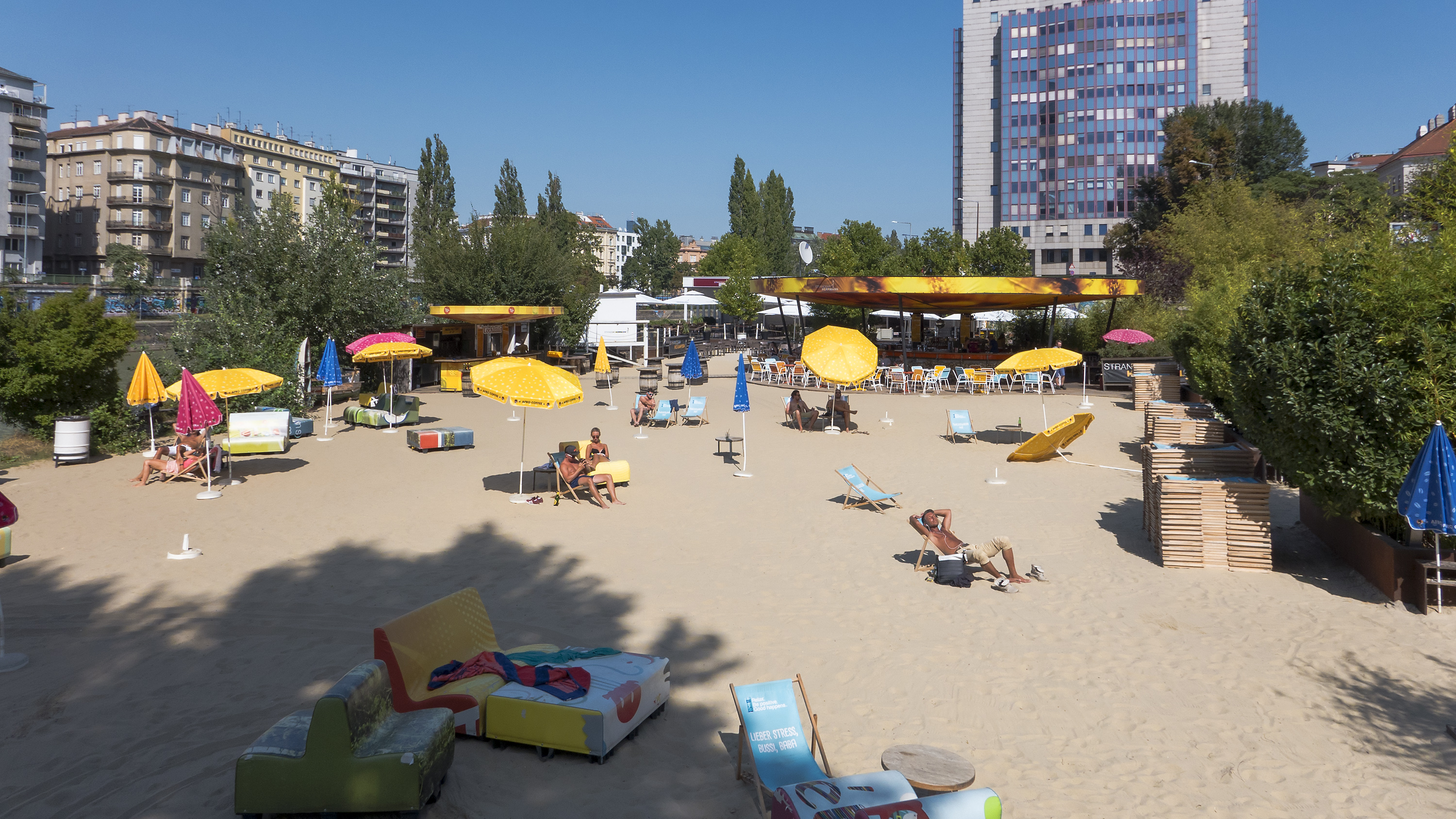 Herrmannpark in Wien 3